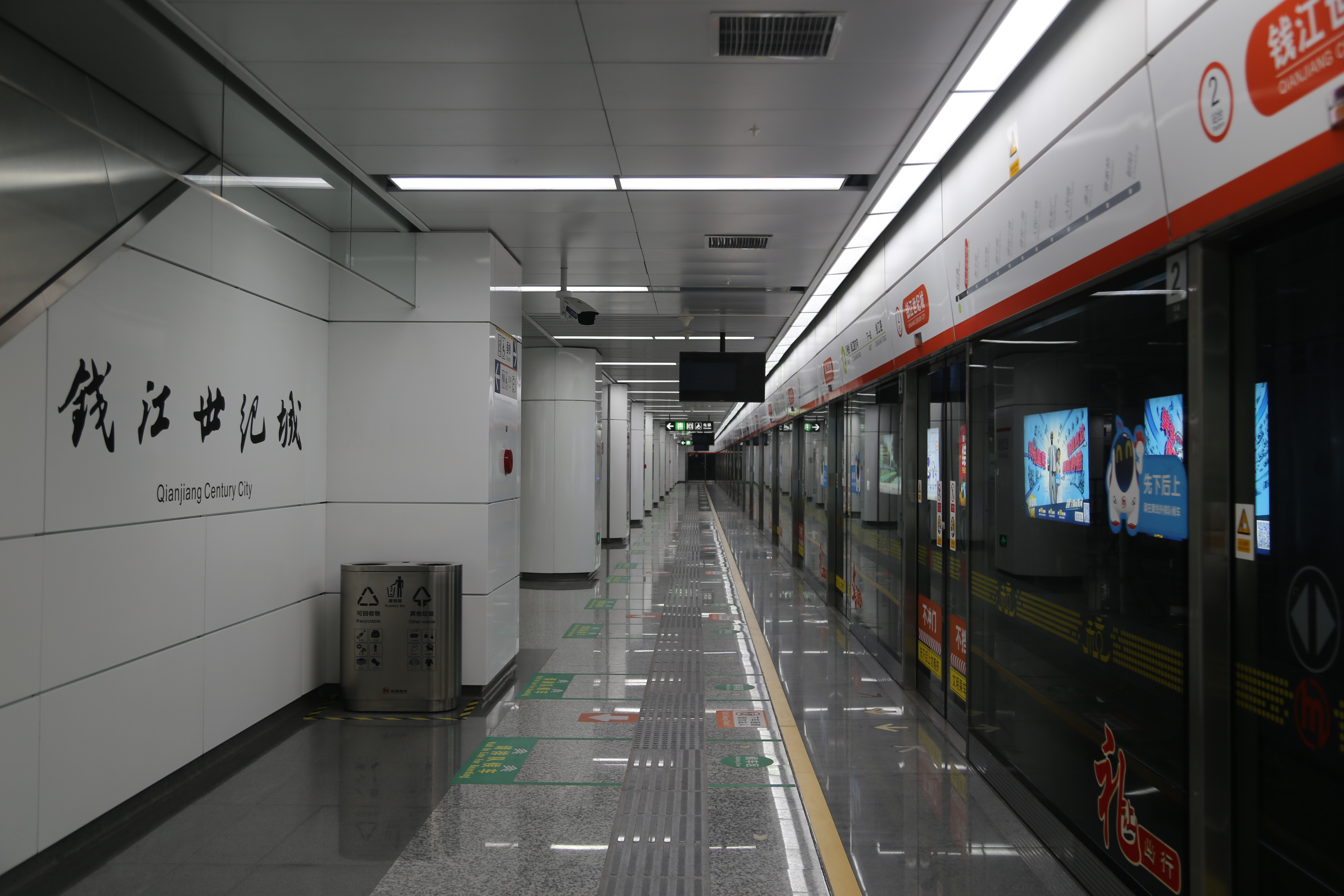 杭州地铁2号线钱江世纪城站站台